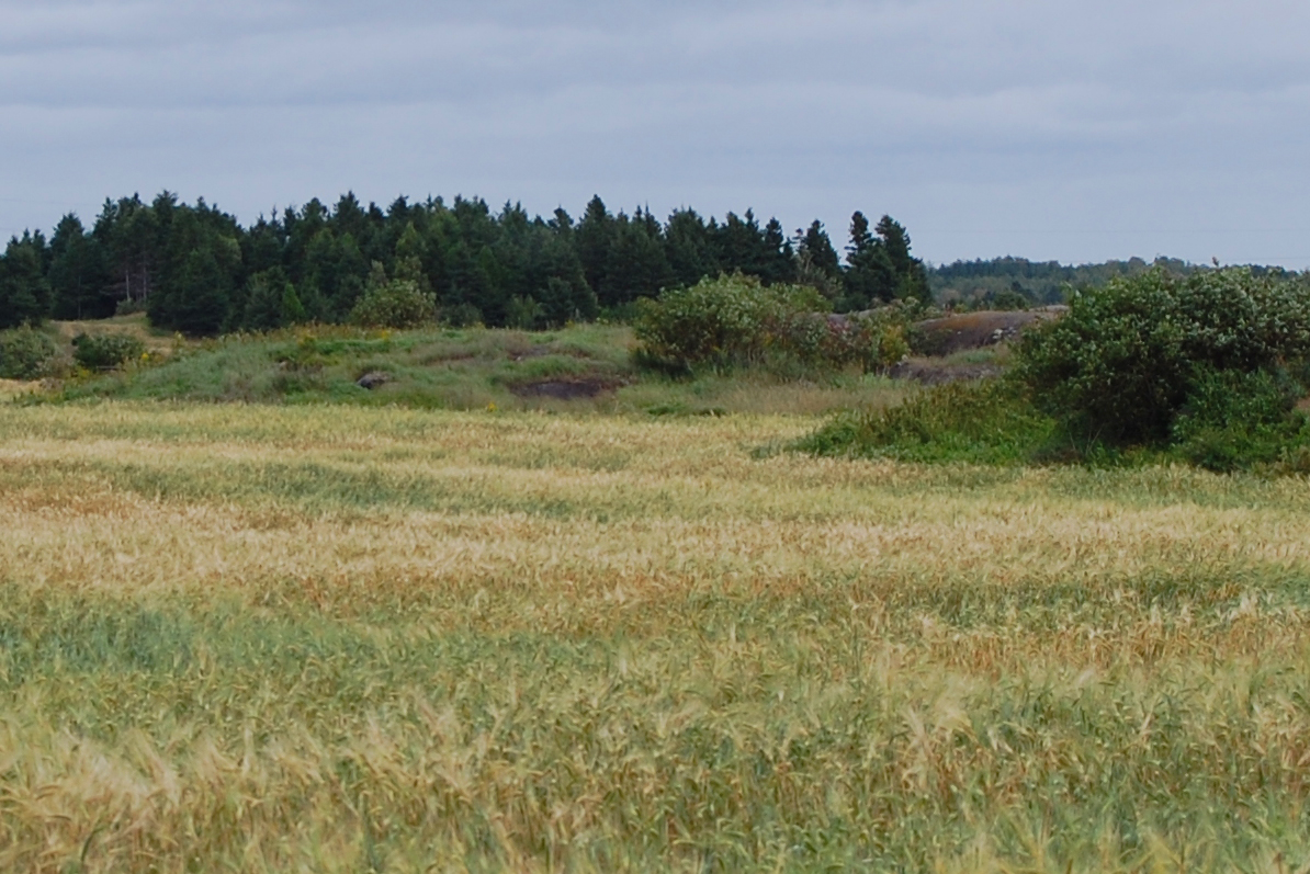 Rochers émergeants dans le Rang des îles